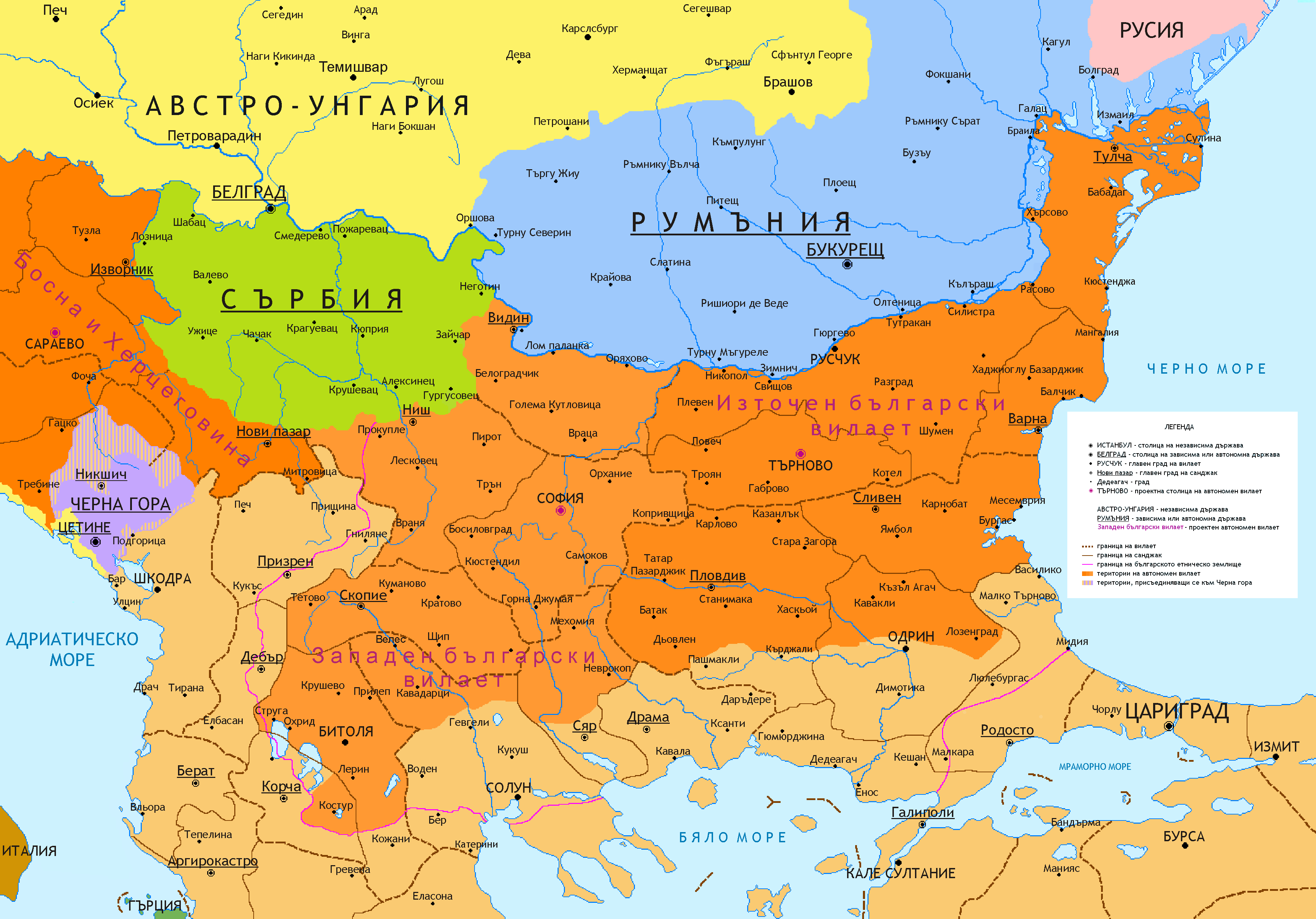 Граници на България според Цариградската конференция, 1876-1877